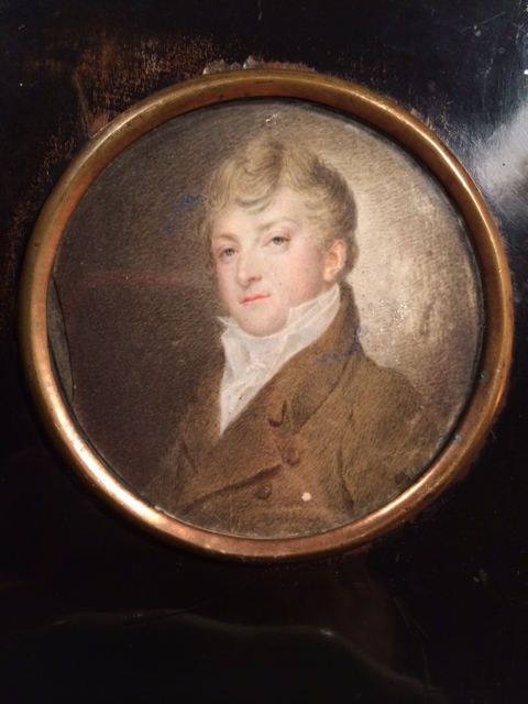 Porträt (Miniatur) von Gottlieb Doderer (1782-1836). Heilbronner Bürger, Zimmermann und Mühlenbaumeister.